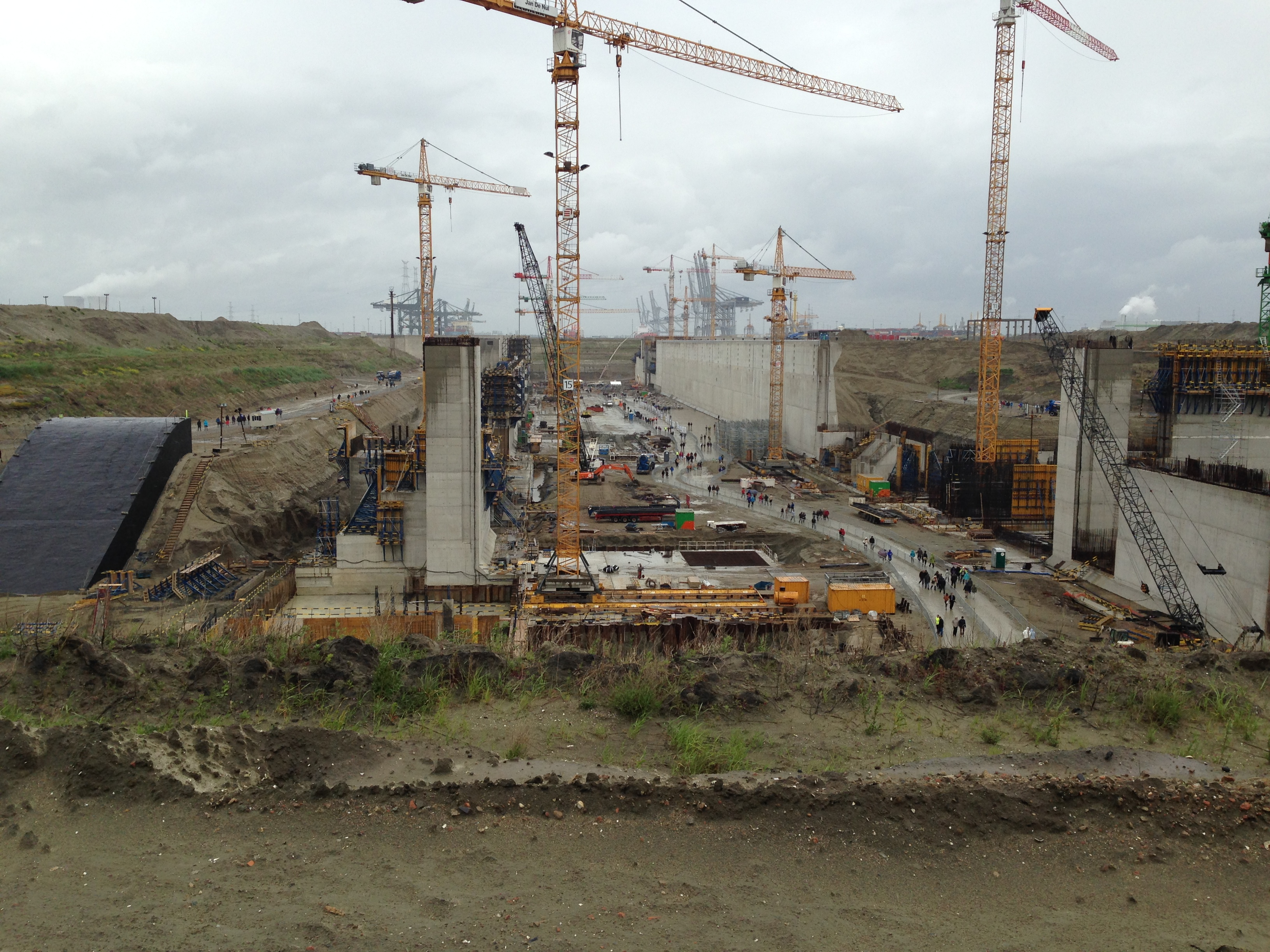 Deurganckdoksluis in aanbouw (2014)